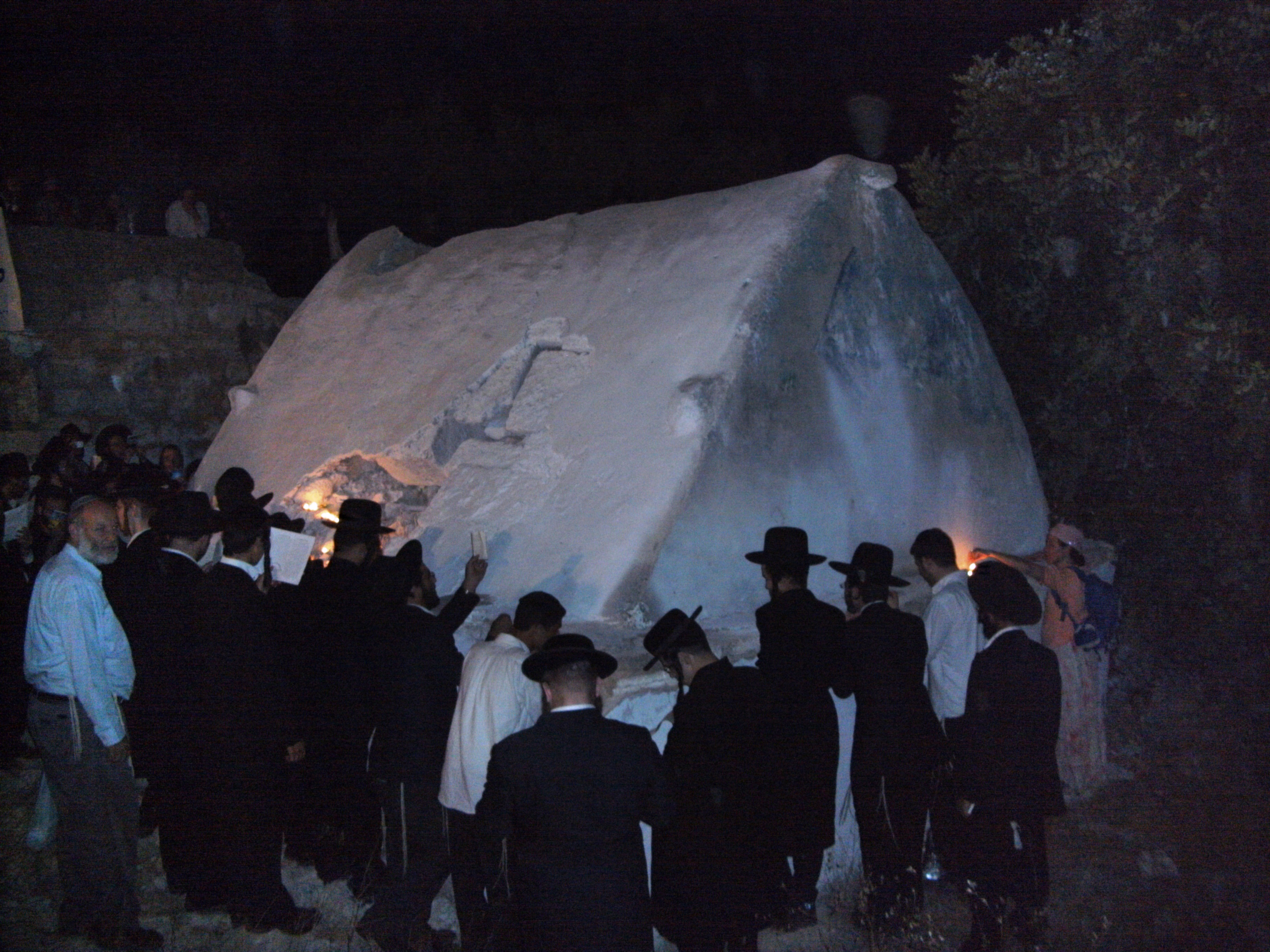 קברי אלעזר ואיתמר בגבעת פינחס (עוורתא)